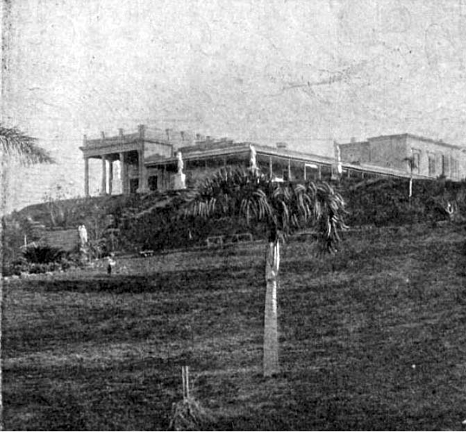 La Quinta de los Olivos, hoy Residencia Presidencial, en 1898, cuando fue donada por Juan Esteban Anchorena para su uso actual.